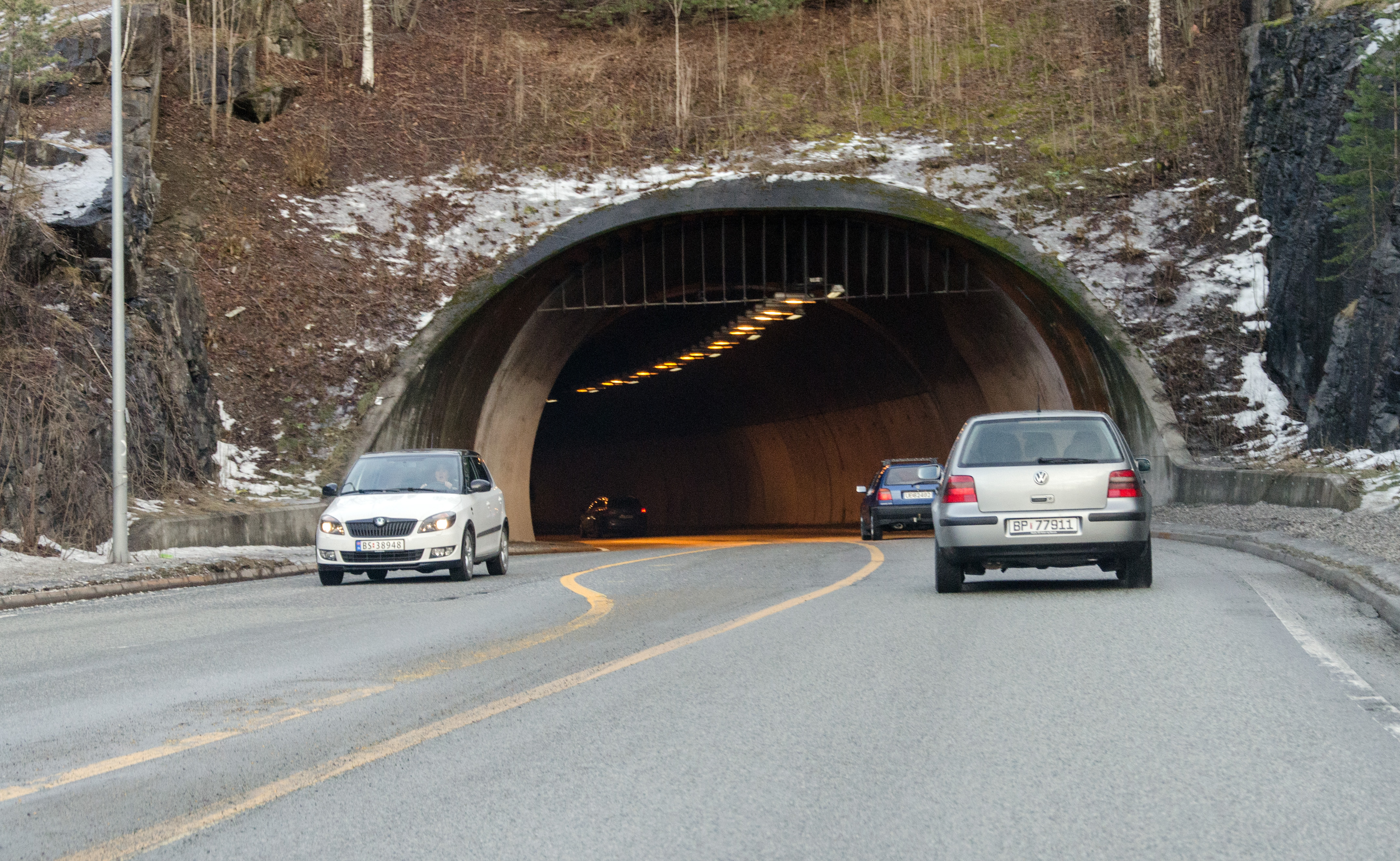 Bekkestuatunnelen